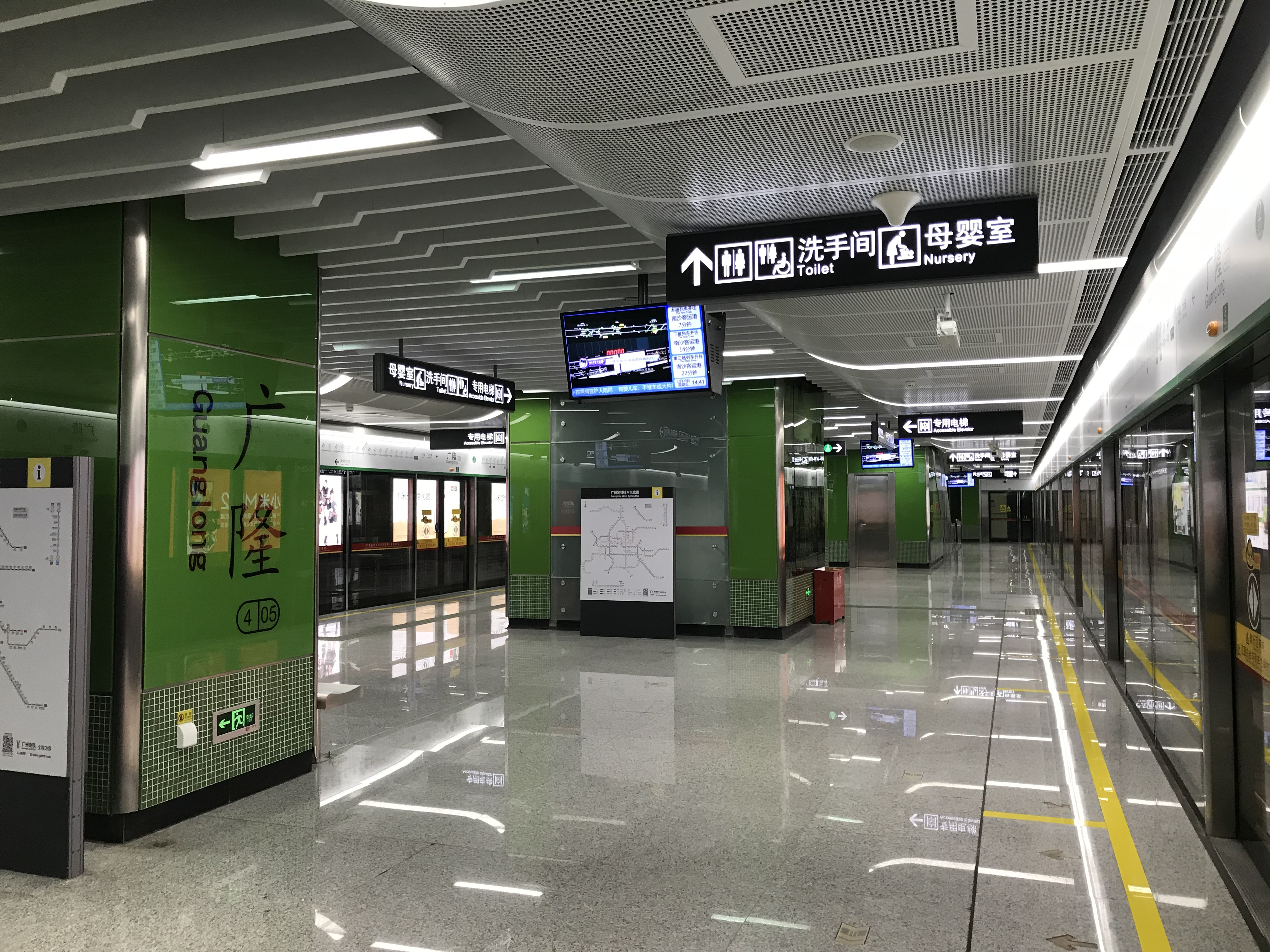 广州地铁广隆站